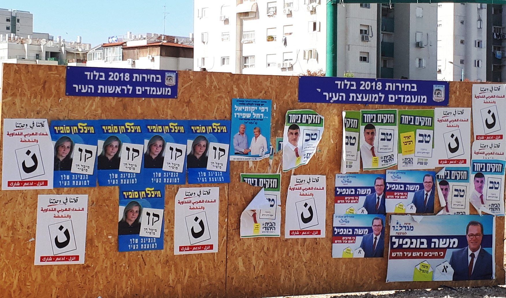 בחירות מקומיות 2018 לוח מודעות למועמדים לבחירות בעיר לוד